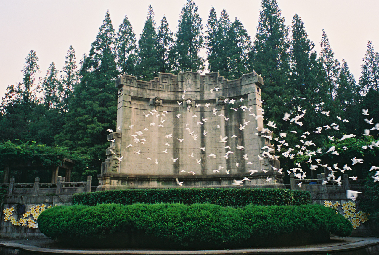 @音乐台, Nanjing